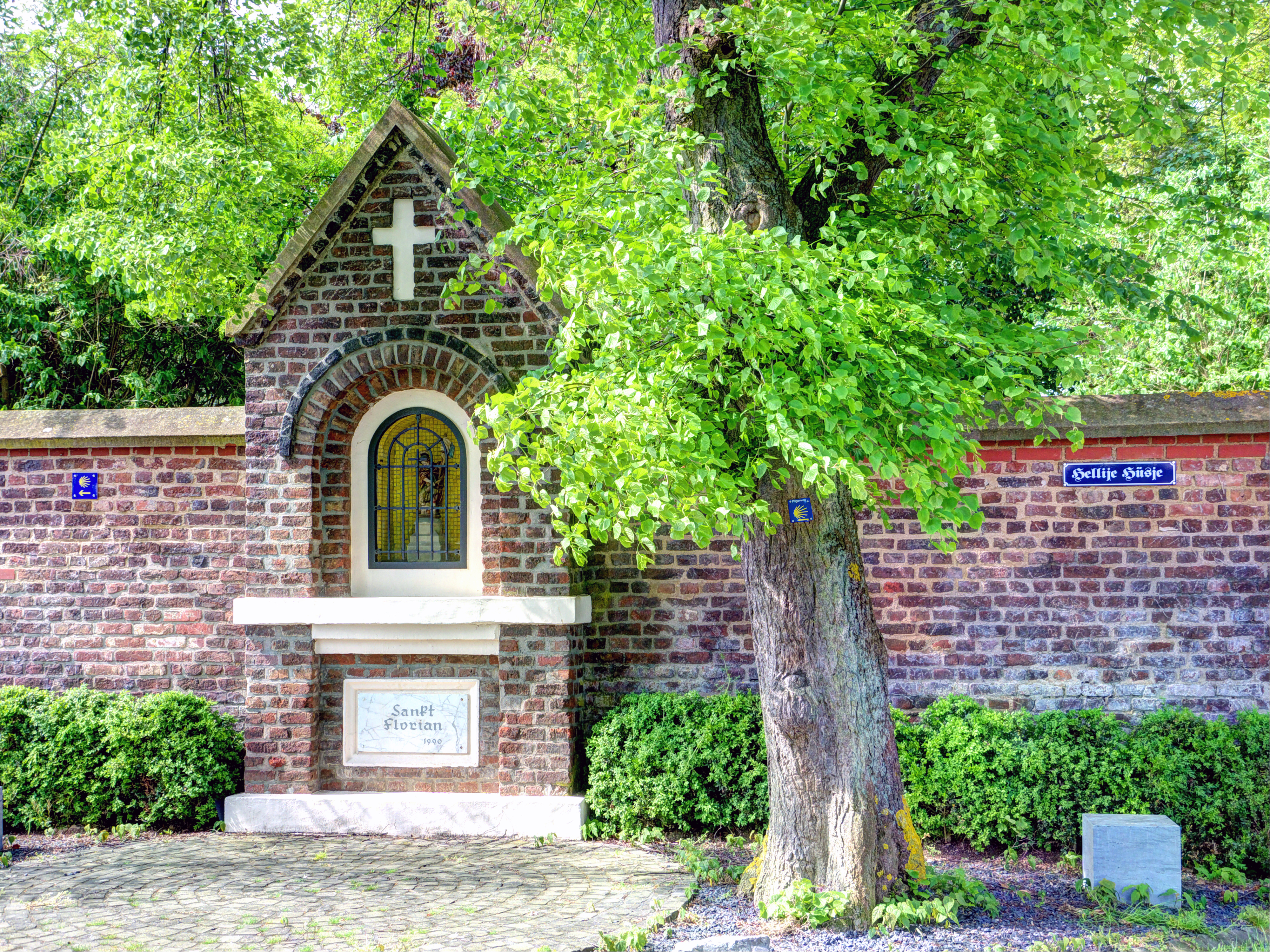 Heiligenhäuschen (St. Florian) in Golzheim (Gemeinde Merzenich)